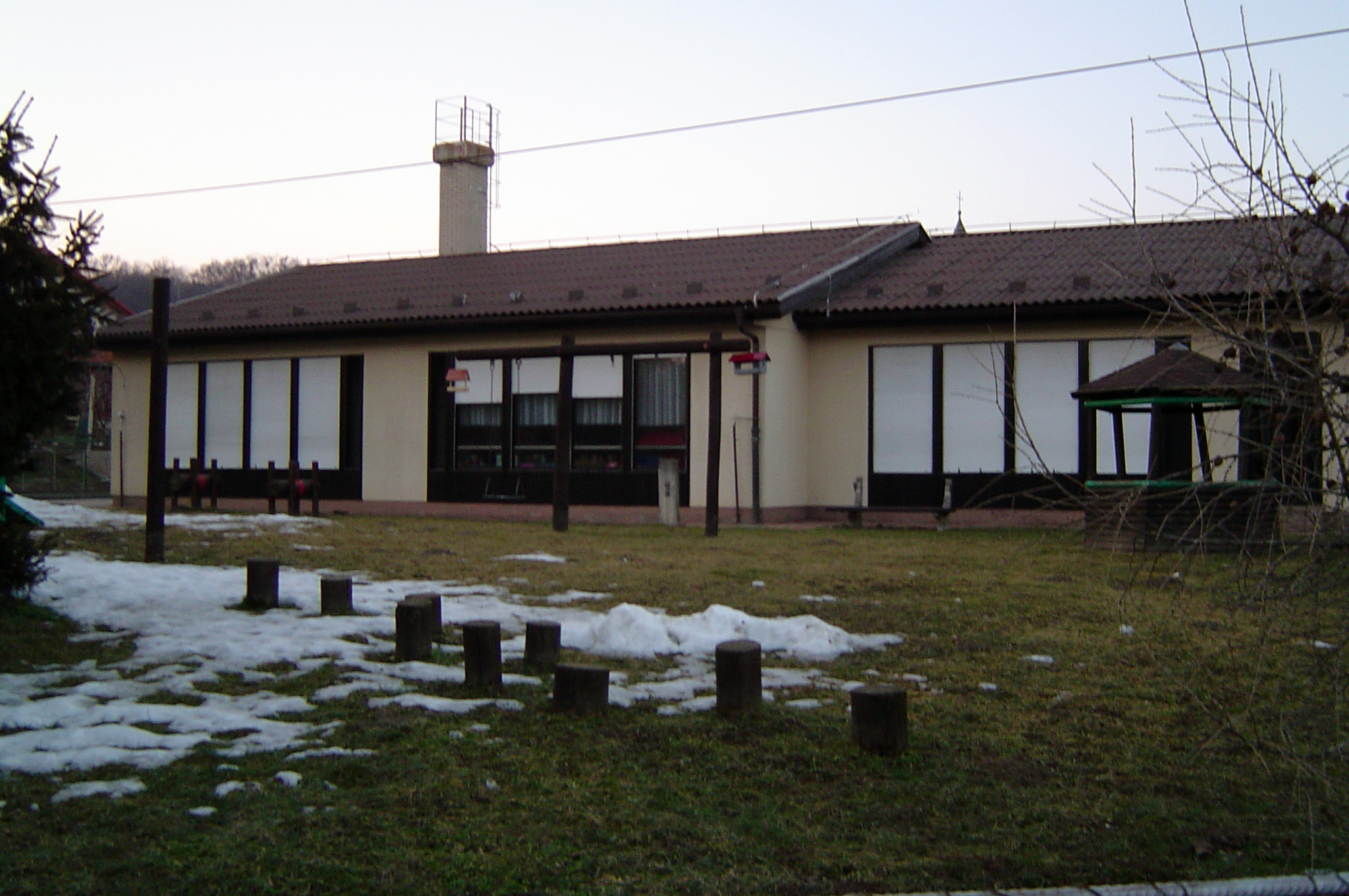 Vrtec Rogoznica.